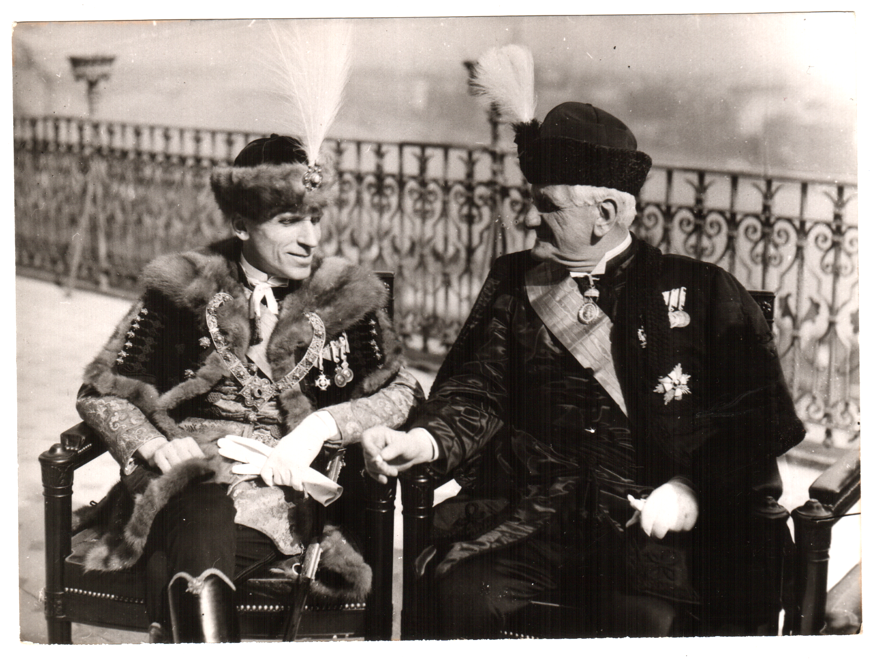 Kánya Kálmán Imrédy Bélával a Miniszterelnöki Palota (Sándor Palota) teraszán. A fénykép feltehetően akkor készült, amikor Darányi Kálmán lemondását követően, Bethlen István javaslatára Horthy Miklós a miniszterelnökké kinevezte és a kinevezés alkalmából fogadta Imrédy Bélát, akinek kormányában Kánya Kálmán külügyminiszter